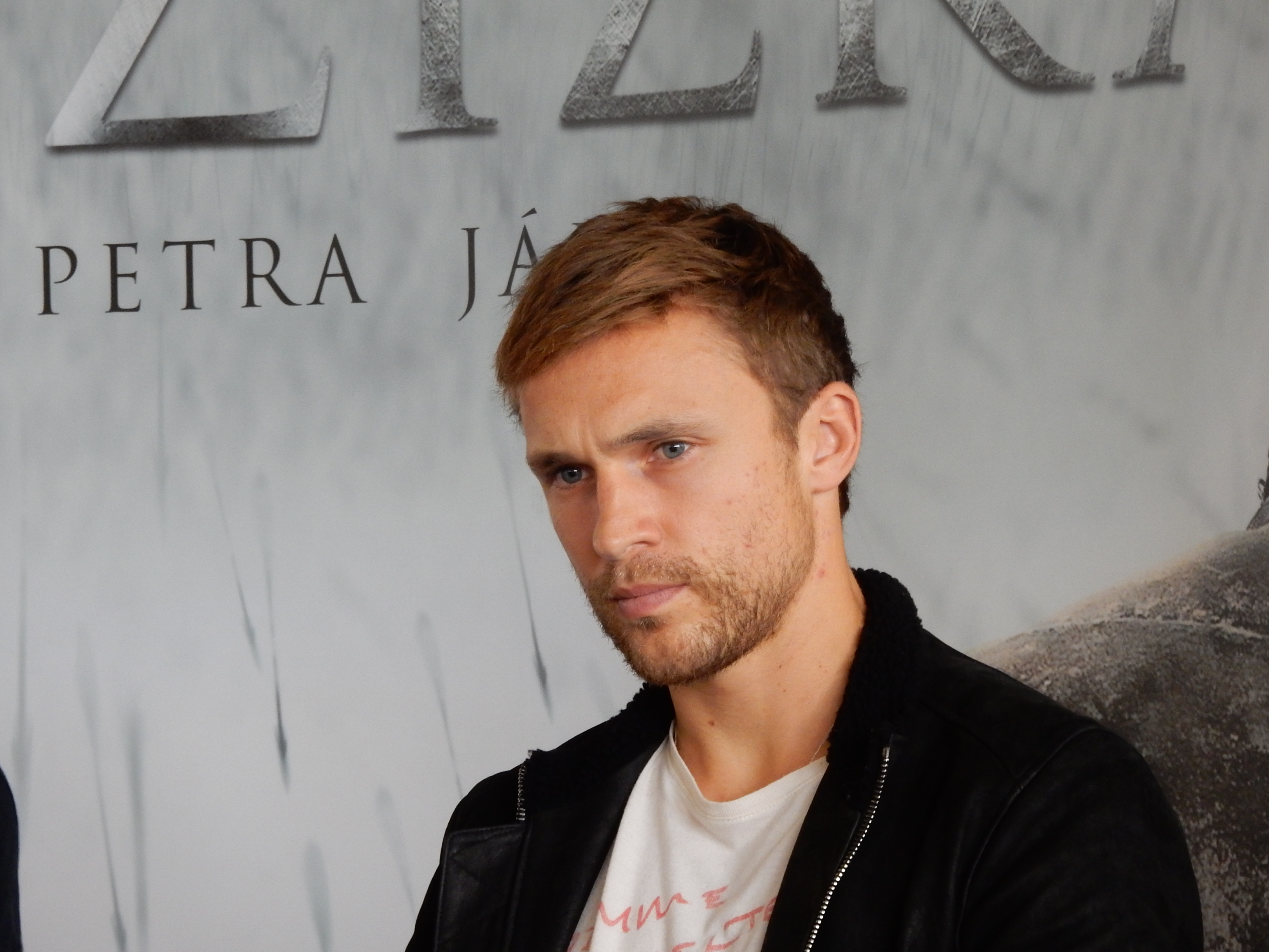 Novinářská konference 13. 9. 2018. Autor: Blanka Borová (Karolína Černá) pro Kritiky.cz